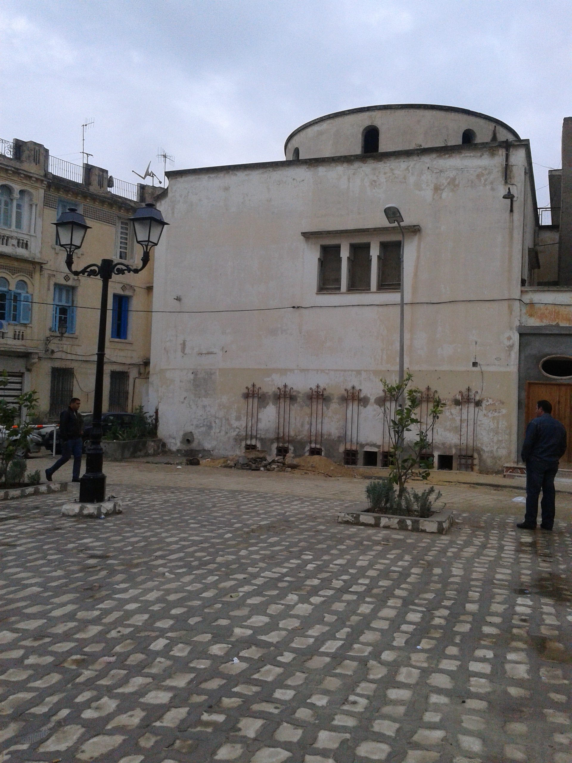 Ancienne synagogue or-torah